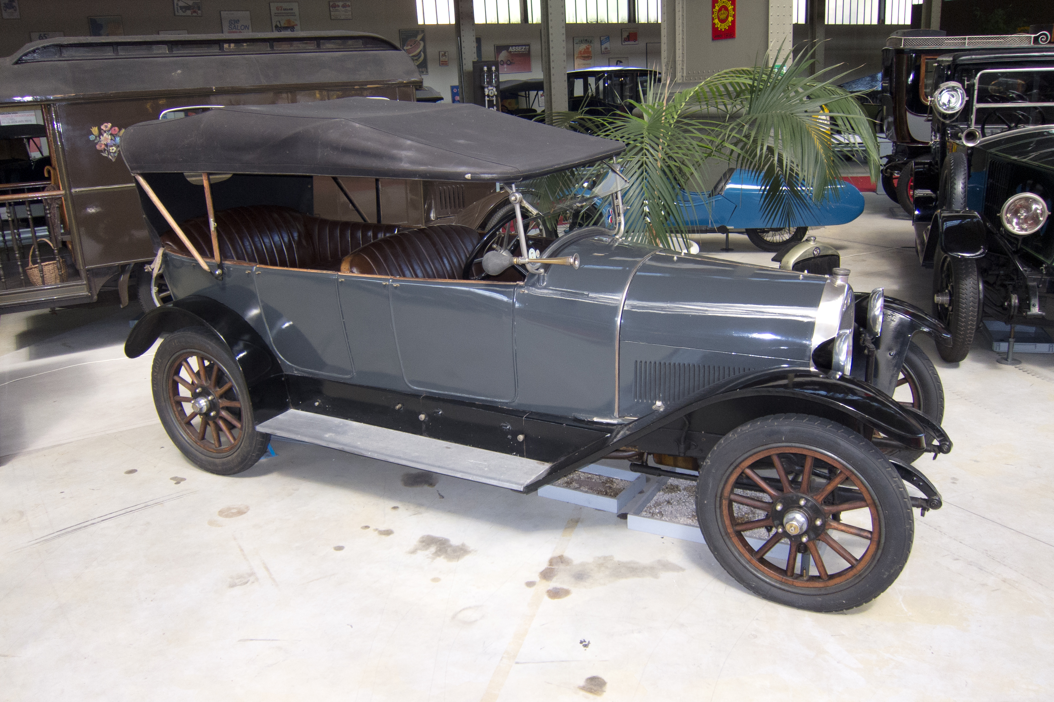 Talbot DUS (1927) at Autoworld Brussels, Belgium, 2011